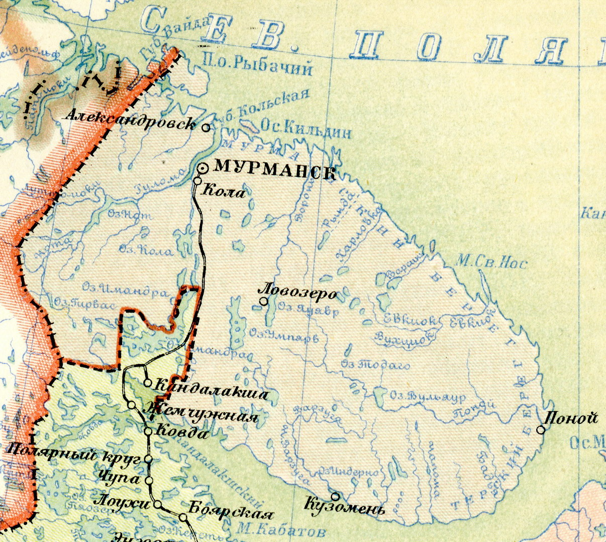 Мурманская область в Атласе Союза Советских Социалистических Республик